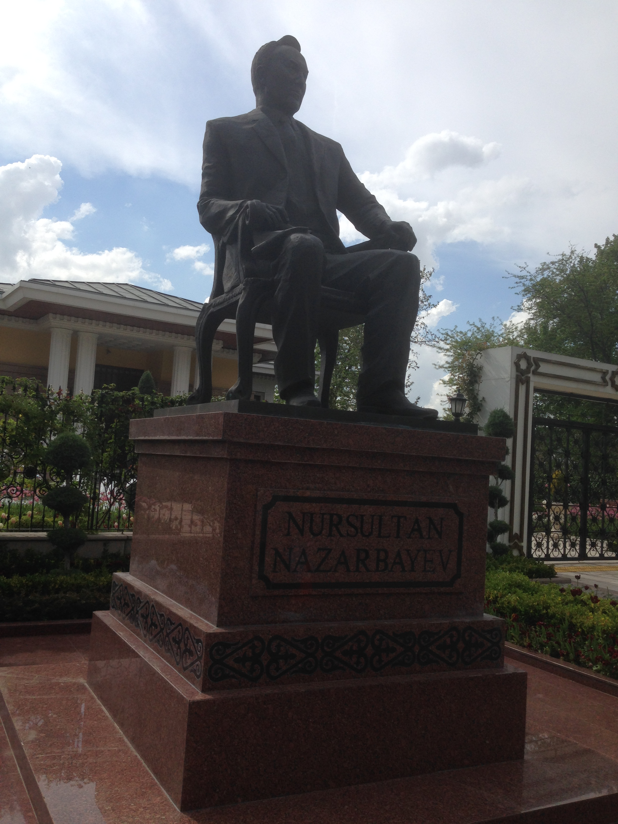 Nursultan Nazarbayev heykeli. Ulus, Ankara